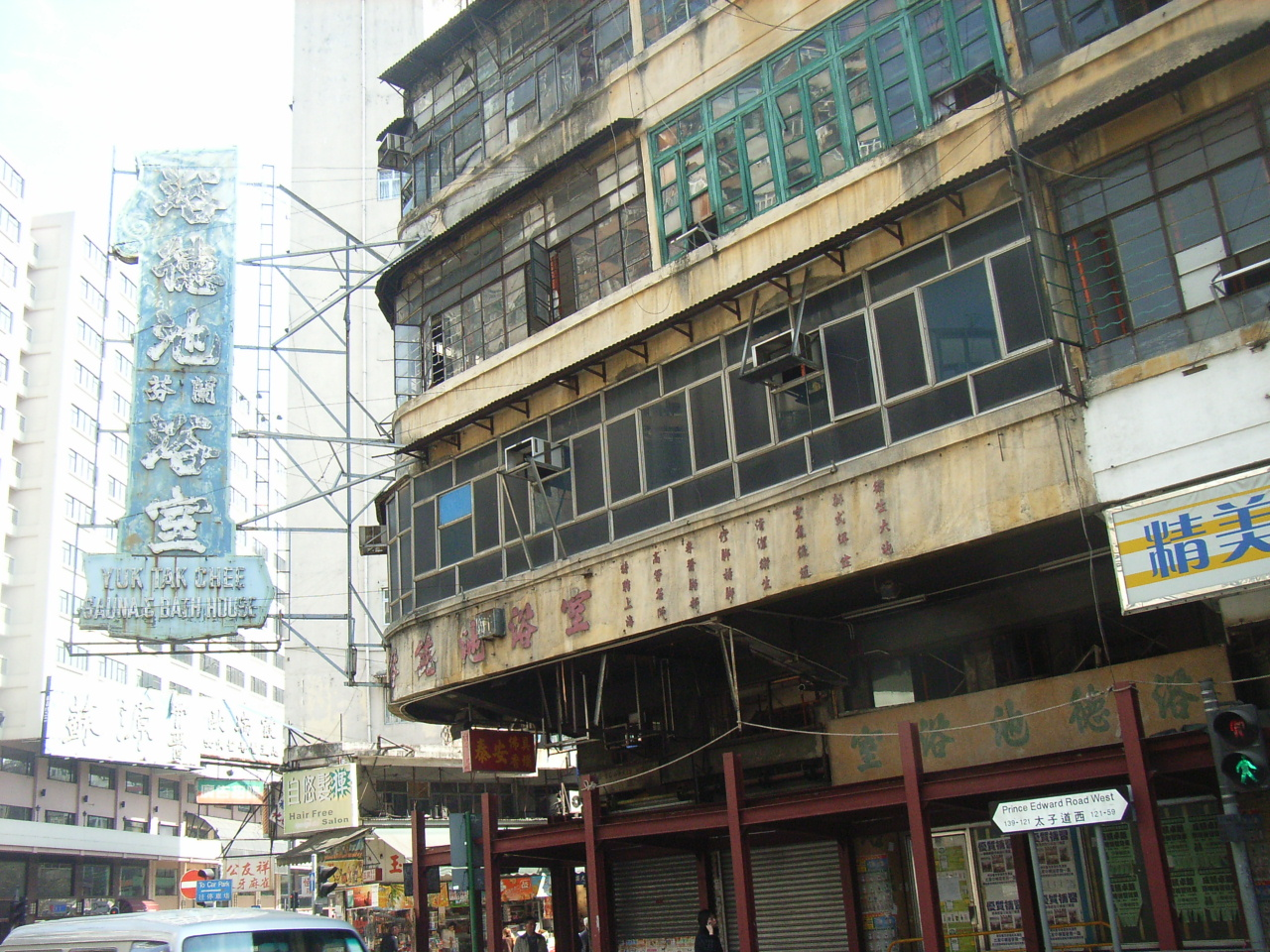 浴德池 (Yuk Tak Chee Sauna) 是香港第一間上海澡堂，位於旺角zh:太子道西123號地下及2樓 Photo by User:OLAMB.